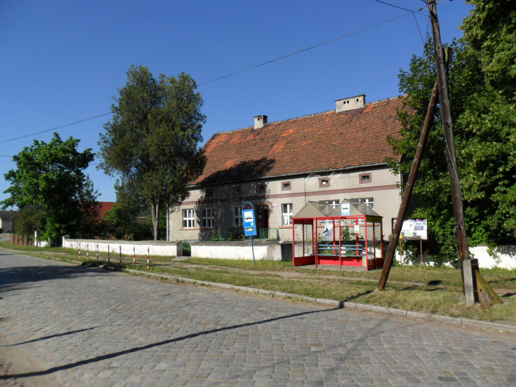 Biecz